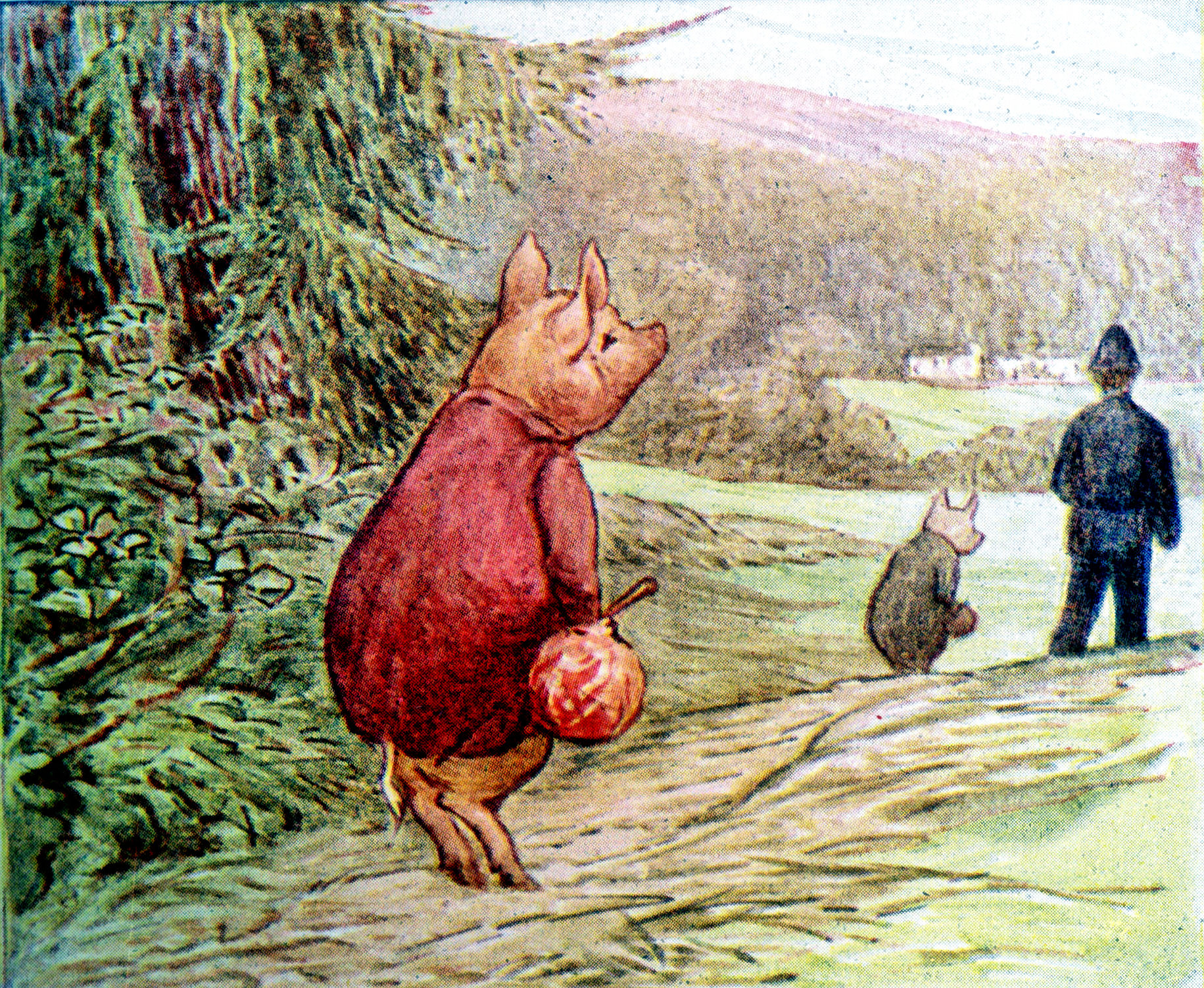 Pigling Bland pg 31.jpg